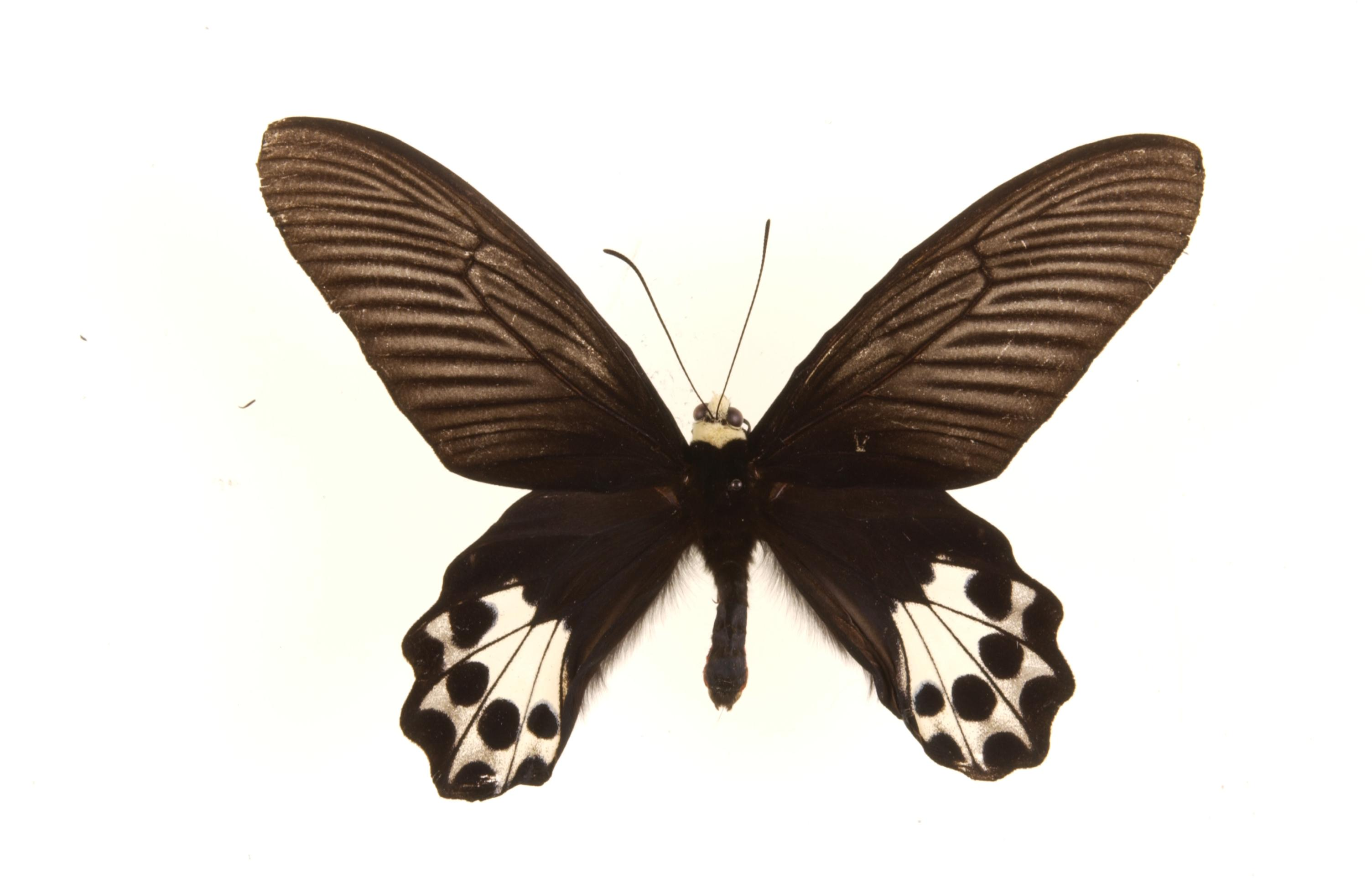 Atrophaneura priapus hageni